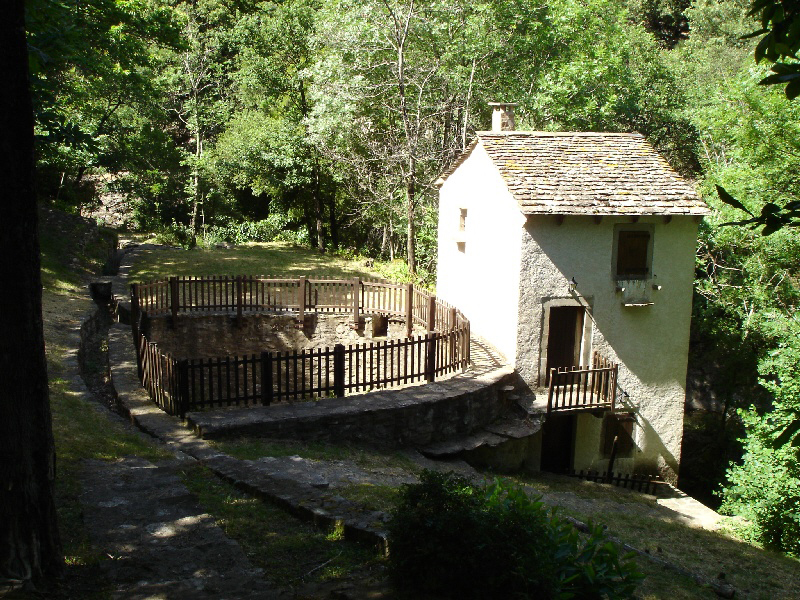 Castanet-le-Haut (Hérault) - Le Moulin du Nougayrol (moulin de type à rodet). Remarquer la cuve à eau (pesquier en occitan), pour stocker l'eau nécessaire au fonctionnement, ainsi que la conduite (beal en occitan) pour amener l'eau à cette cuve.